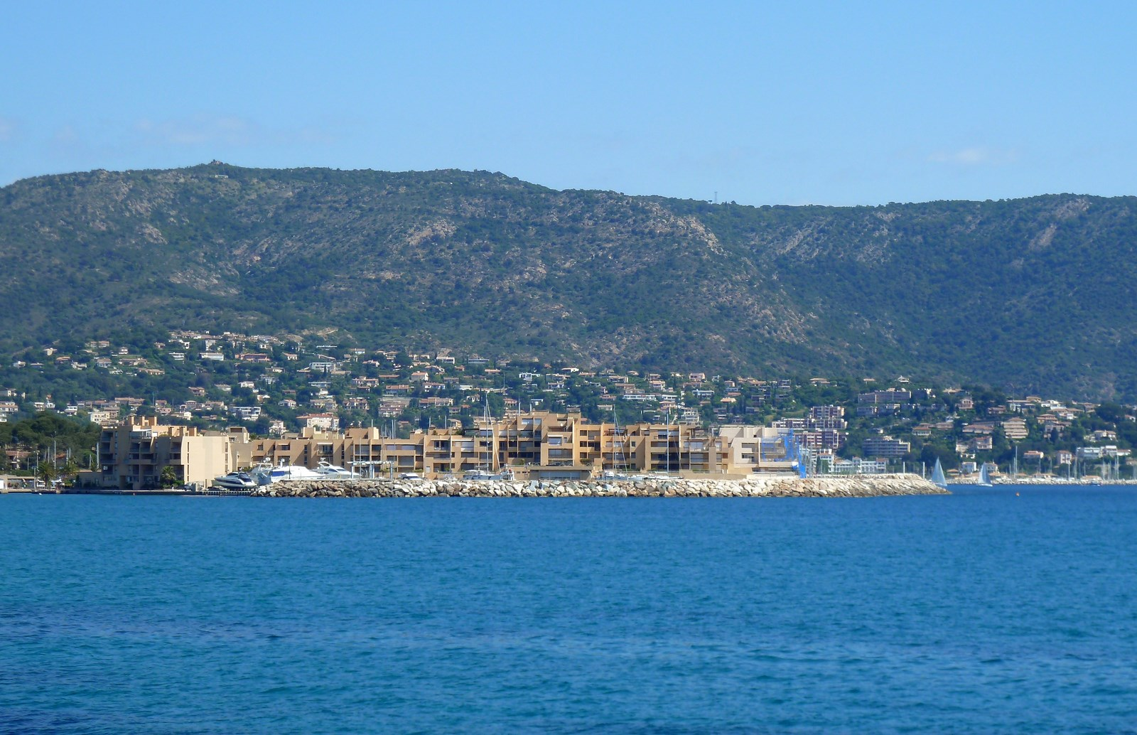 Port de la Favière, Bormes les Mimosas. Vue du Cap Bénat